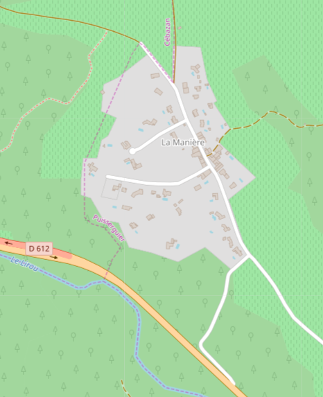 Plan du hameau de la Manière (34). Données disponibles sous licence ODbL.